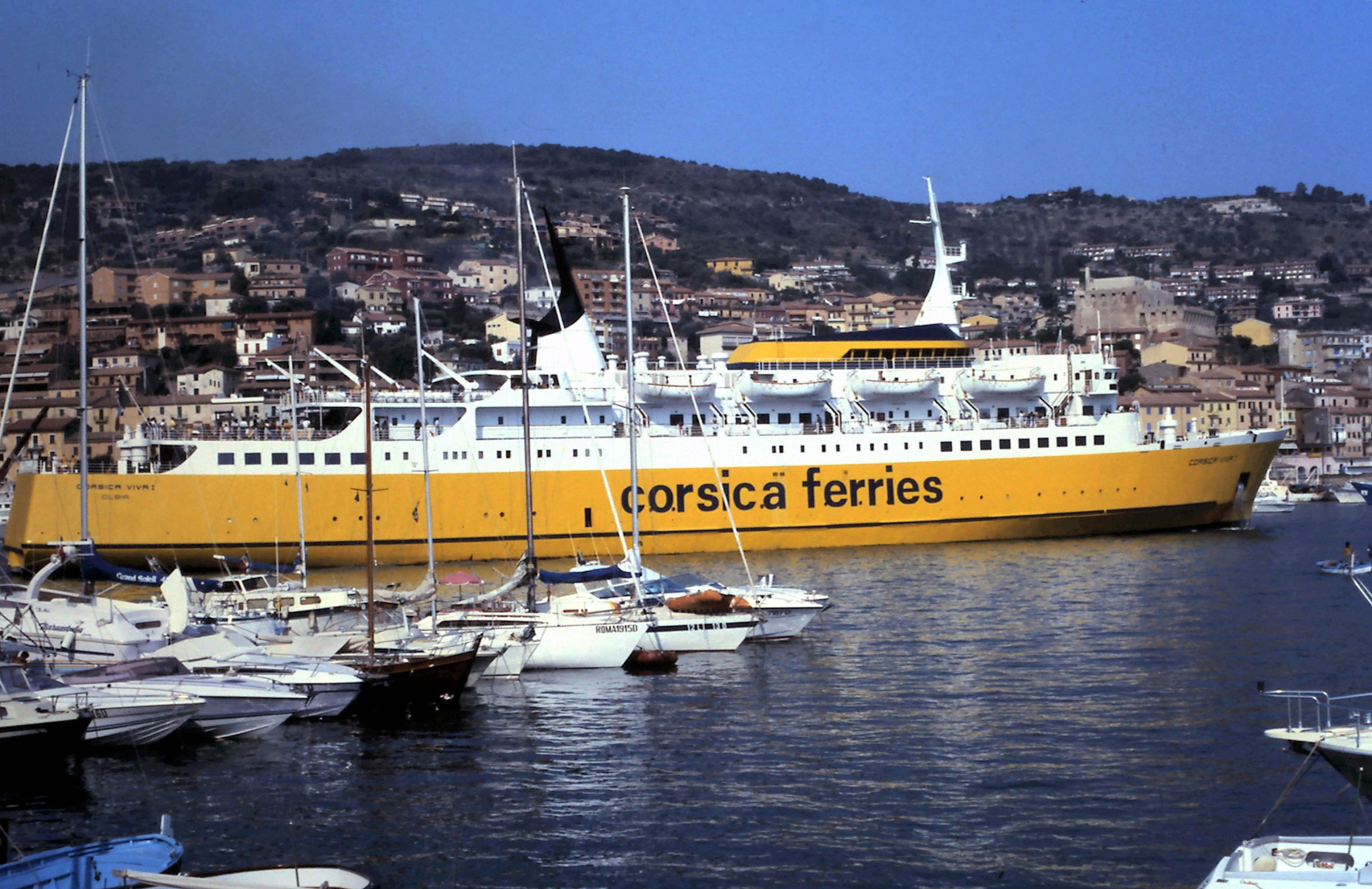 Le ferry Corsica Viva à Porto Santo Stefano